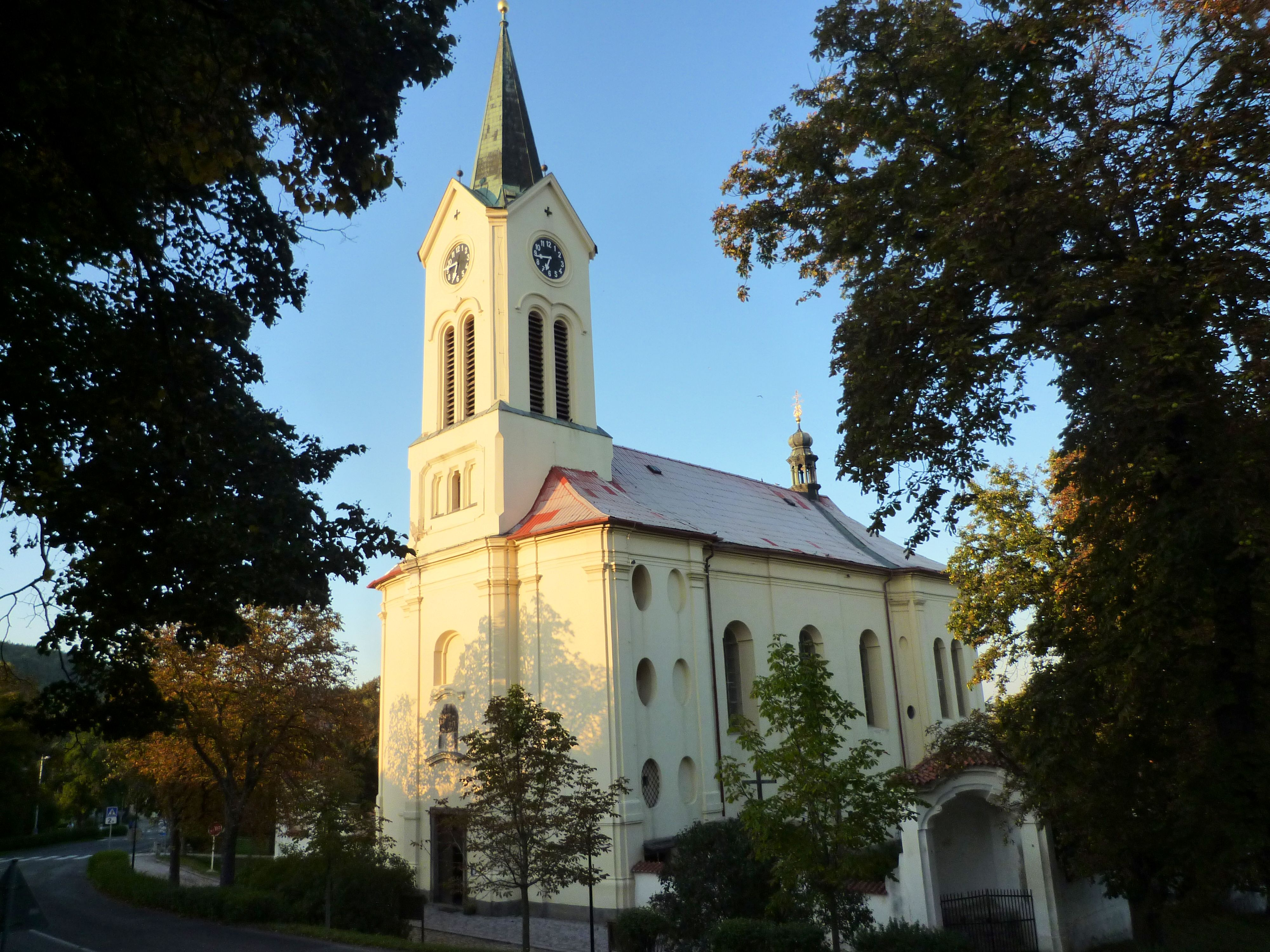 Kostel sv. Václava (Mníšek pod Brdy), nám. F. X. Svobody, Mníšek pod Brdy